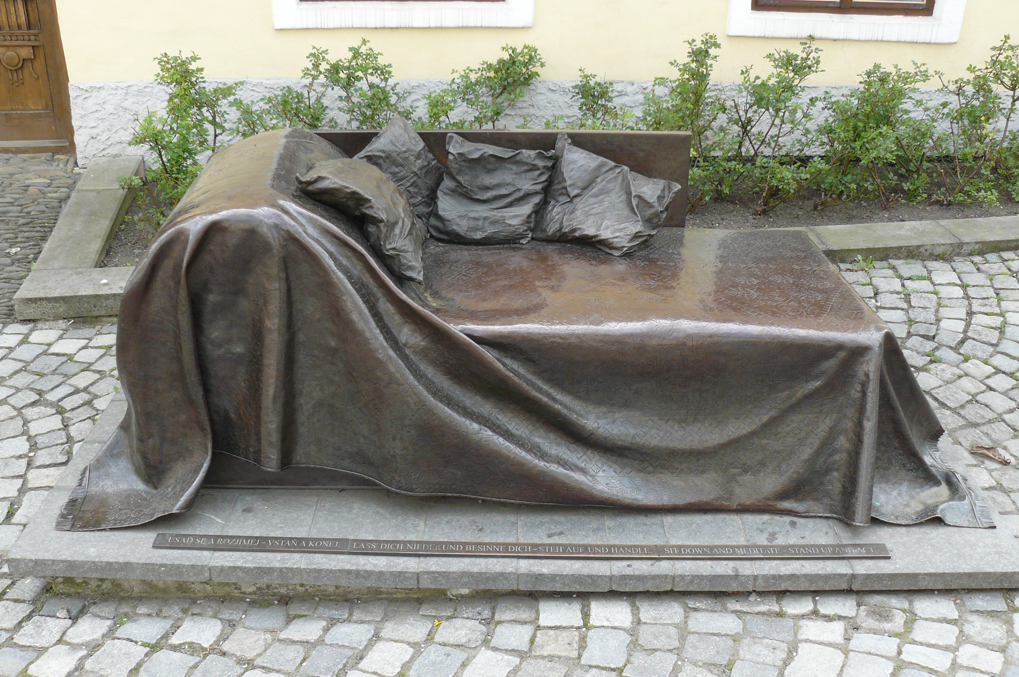 Dom urodzin Zygmunta Freuda w Priborze.